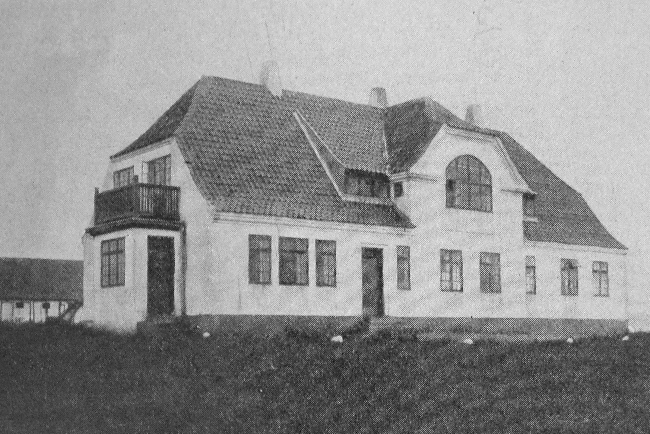 Jenle 'Jeppe Aakjærs ejendom i Salling nord for Skive